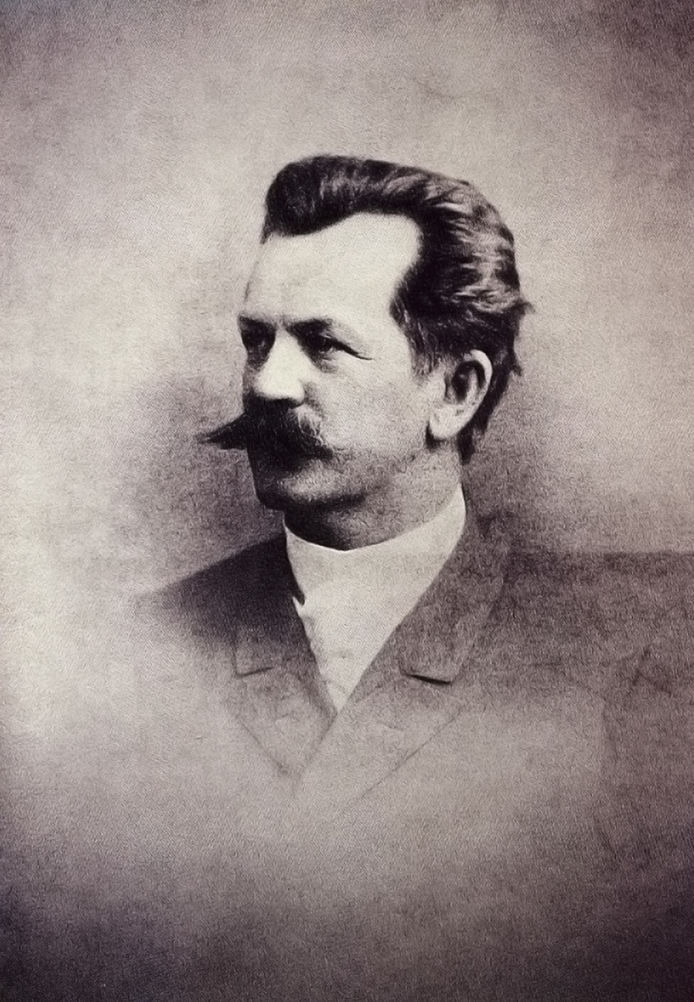 Ernst Ziller, portrait